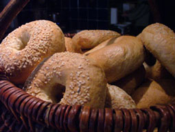 Żydowskie pieczywo Bagel